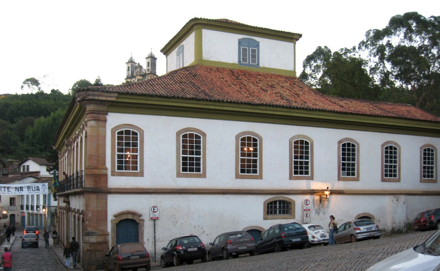 Casa dos Contos, Ouro Preto Minas Gerais